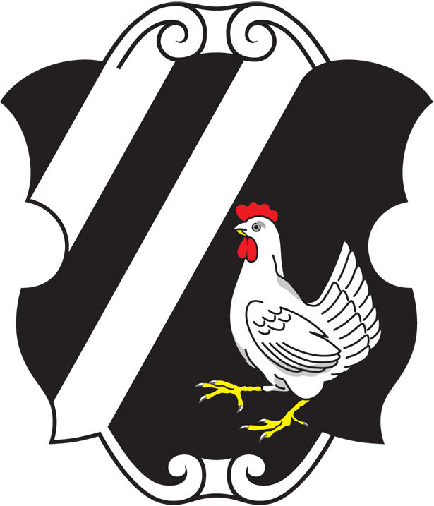 Die rechte Schildhälfte mit den Schrägbalken und die Grundfarben des Wappens silber und schwarz sind dem Geschlecht der Tanner entnommen, die seit dem 13. Jhdt. als Ministerialen die Erbkämmerer des Erzstiftes stellten und mit den Burgen Altentann und Lichtentann ihren Sitz im Gemeindegebiet hatten.